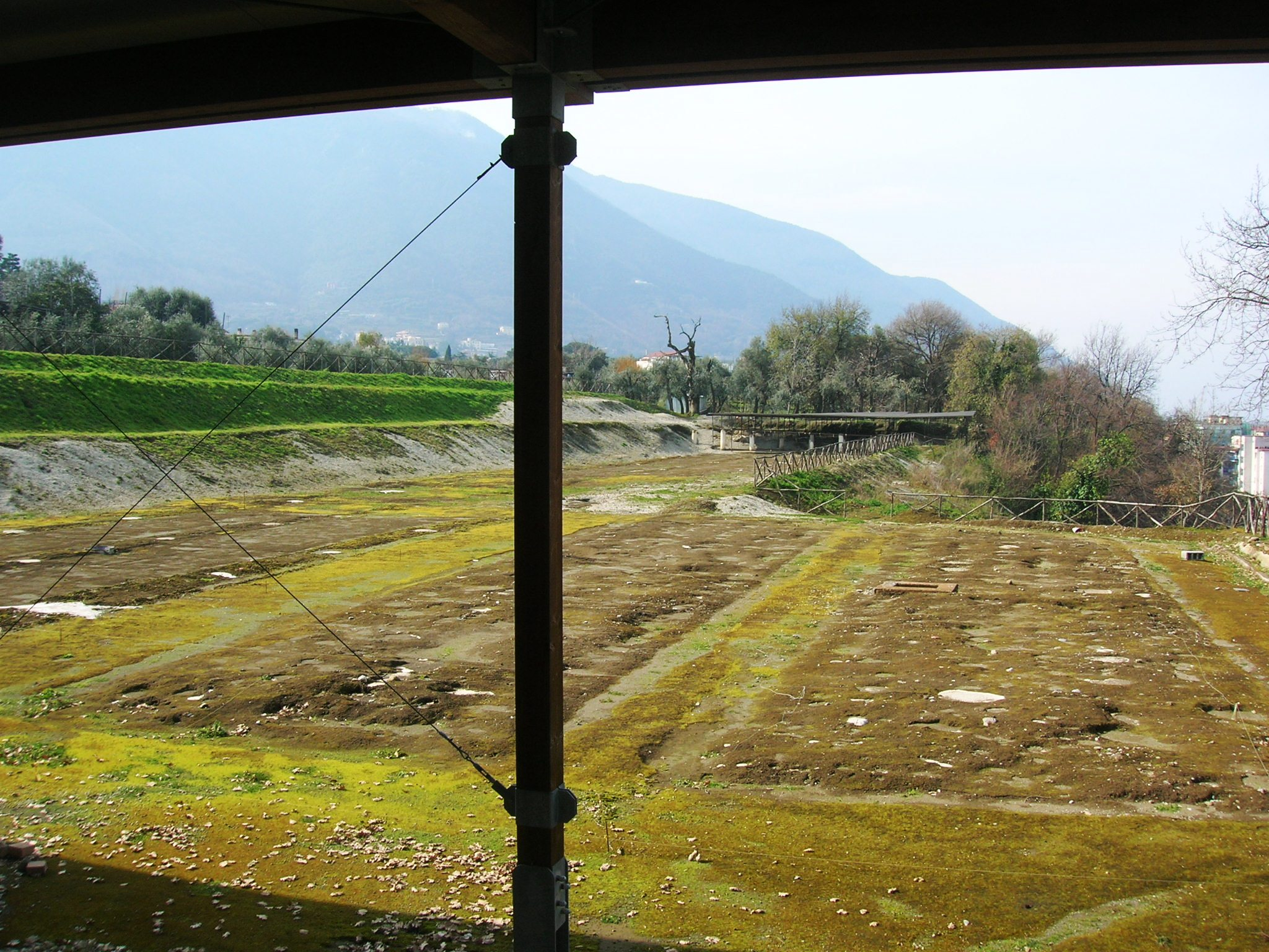 Villa Arianna, villa d'otium dell'antica Stabiae, l'odierna Castellammare di Stabia